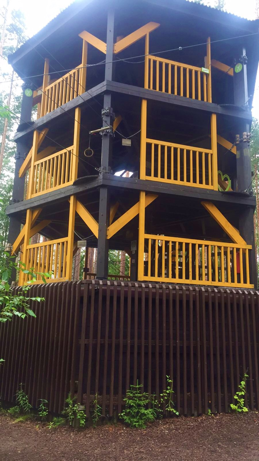 Rope park in the Leningrad region, Russia. Starting tower